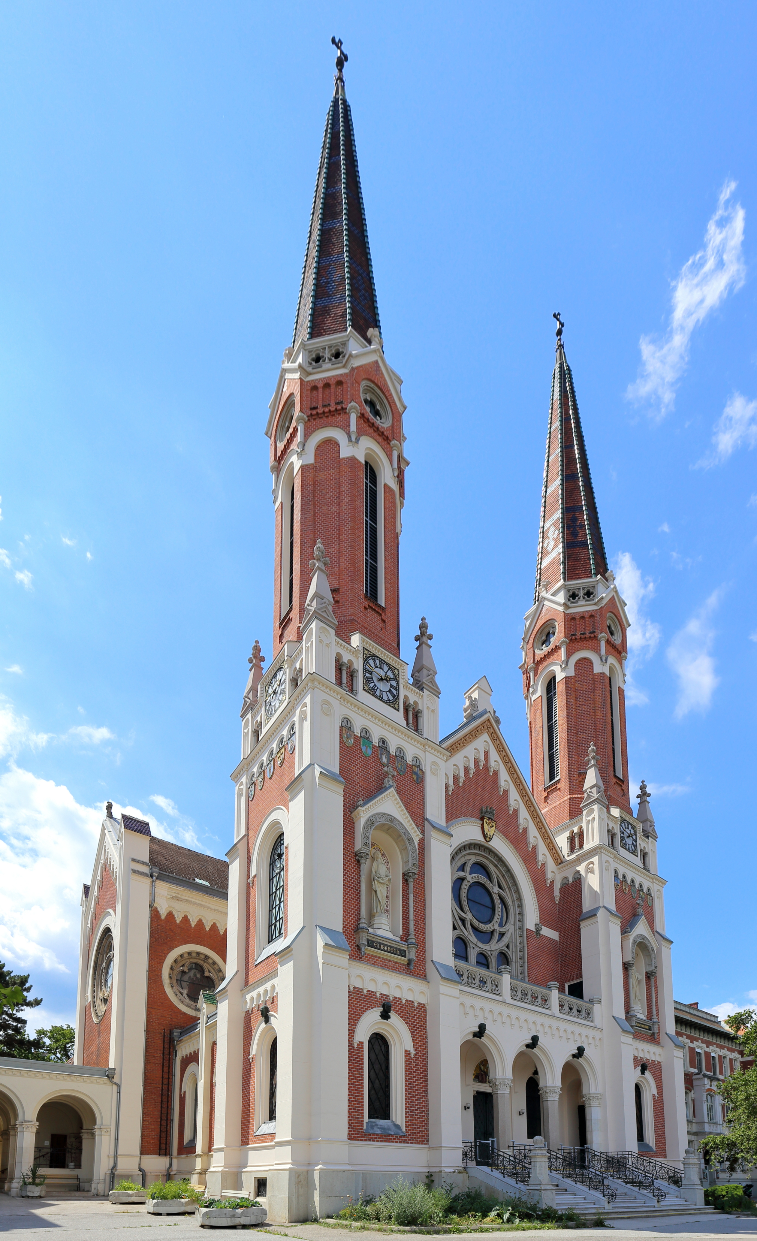 Südostansicht der Versorgungsheimkirche im 13. Wiener Gemeindebezirk Hietzing.Sie wurde im Zuge der Anlage des Lainzer Versorgungsheims als Anstaltskirche von 1902 bis 1904 nach Plänen von Johann Scheitinger errichtet. Die neoromanische Sichtziegelbasilika ist 16 m breit und 38 m lang. Die beiden Türme sind 54 m hoch und weithin sichtbar.